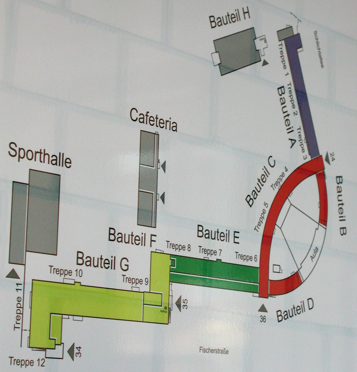 Bauteil-Übersicht der Max-Taut-Schule